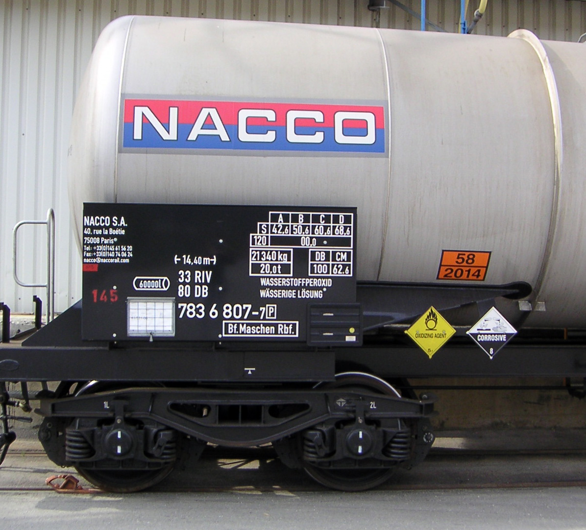 Gefahrguttransport auf der Schiene